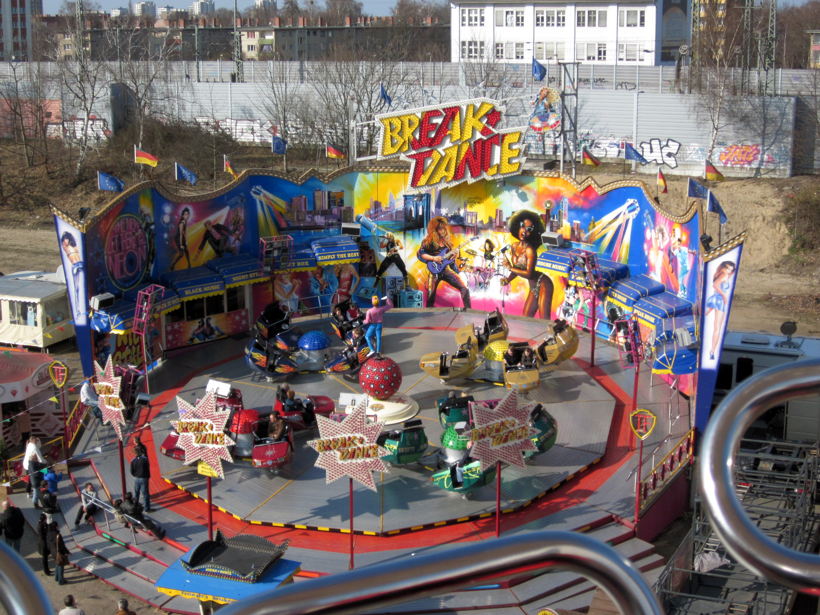 Break Dance in Berlin Spandau beim "Emotion Pur"